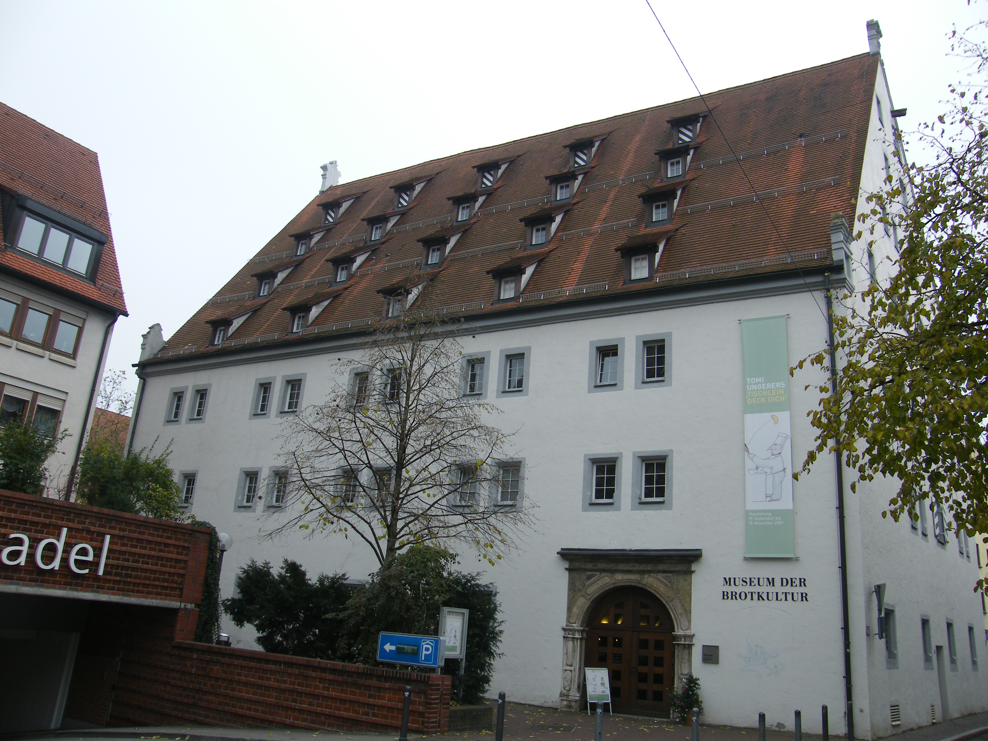 Museum der Brotkultur in Ulm